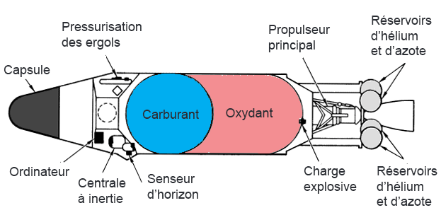 Schéma de l'étage de fusée Agena B avec des libellés en francais